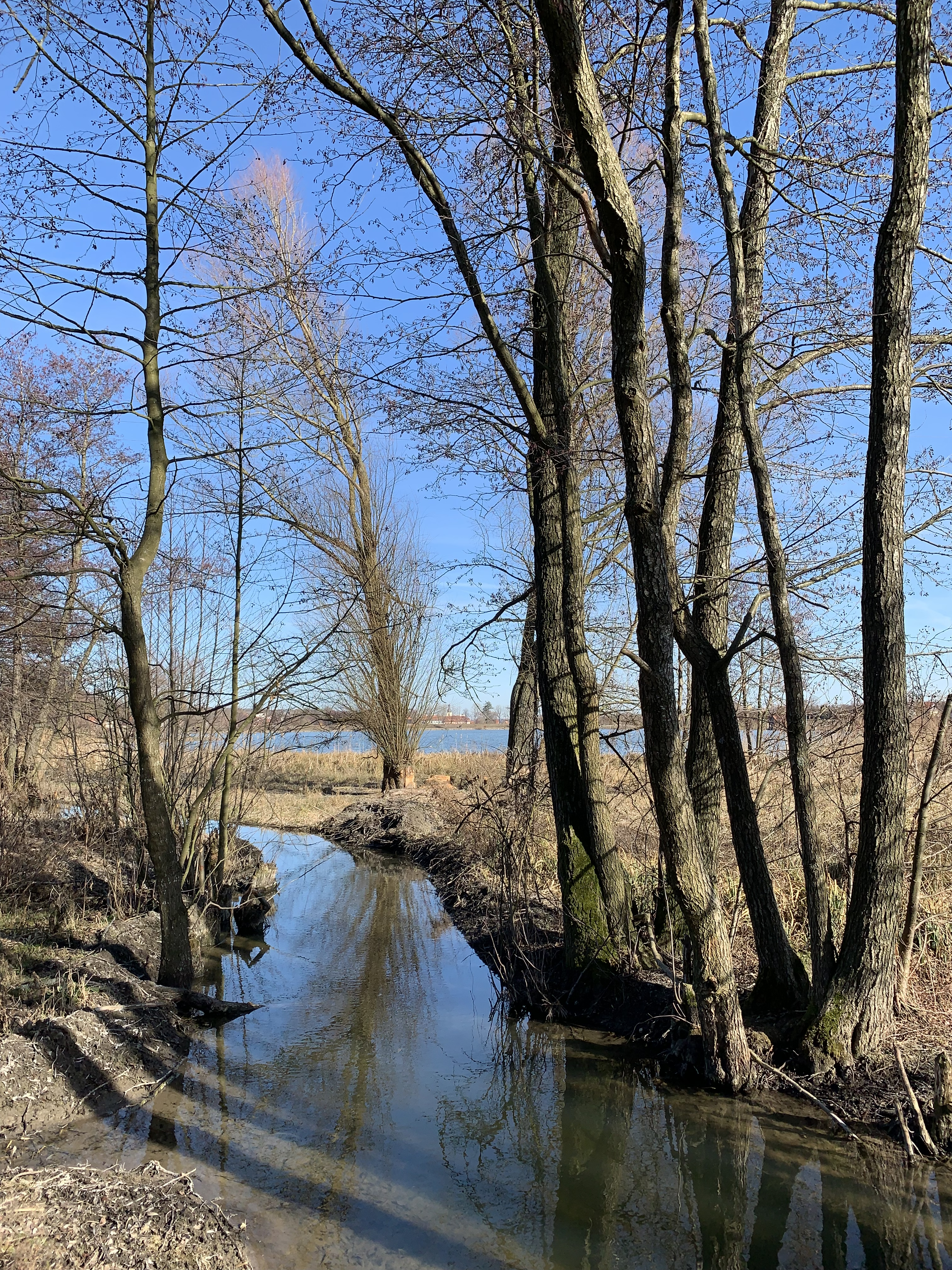 Im Vordergrund des Bildes sieht man die Zenn, die weiter hinten in den Obernzenner See fließt.